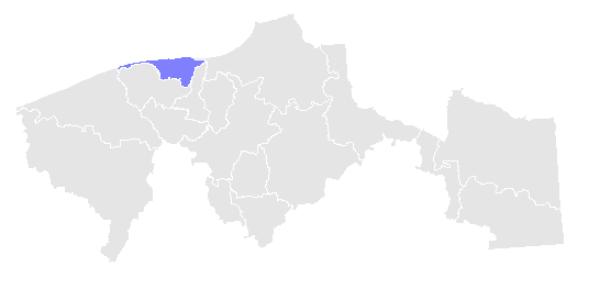 CParaíso, Tabasco. Hecho con Microsoft Paint